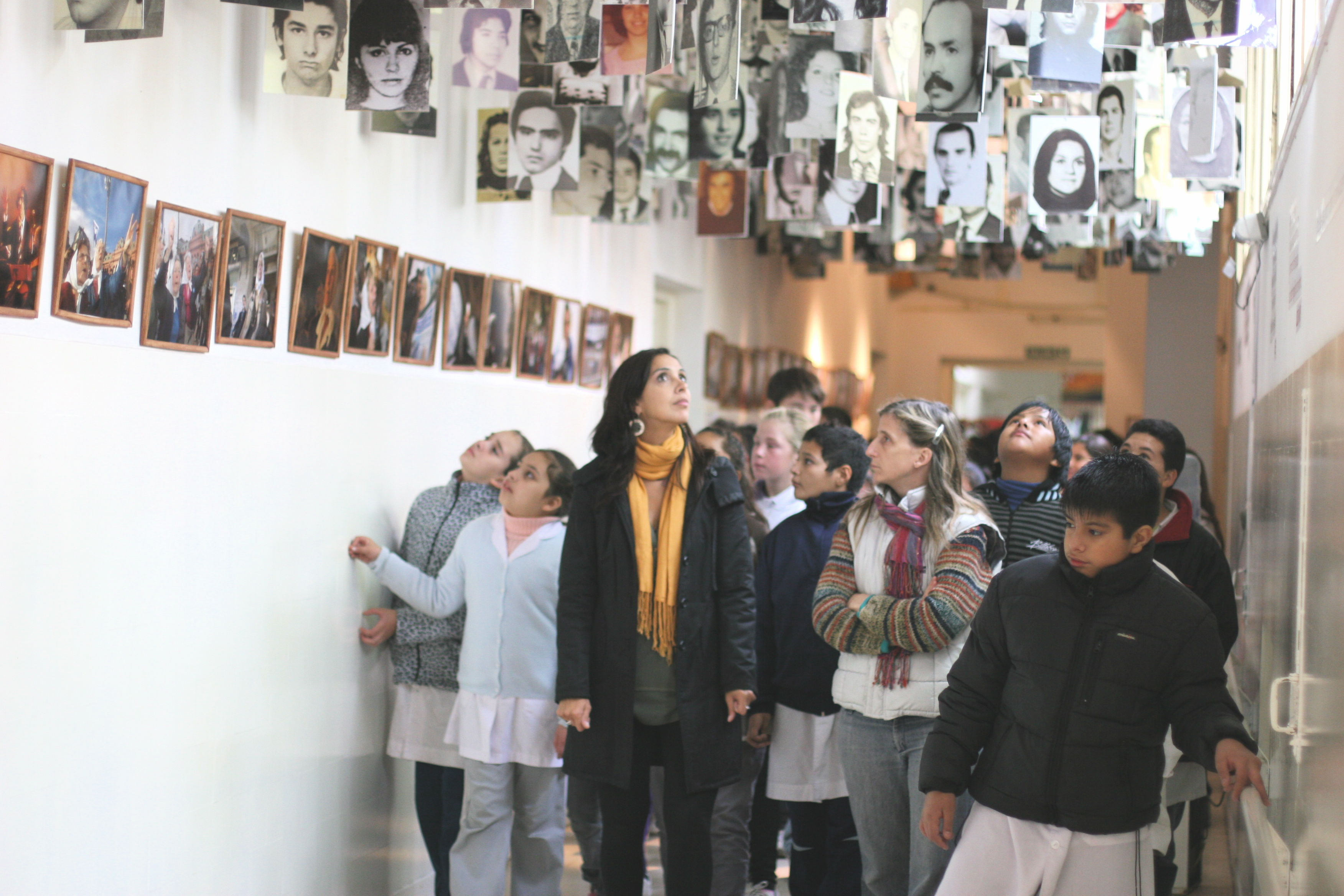 Clases visitando el ECuNHi